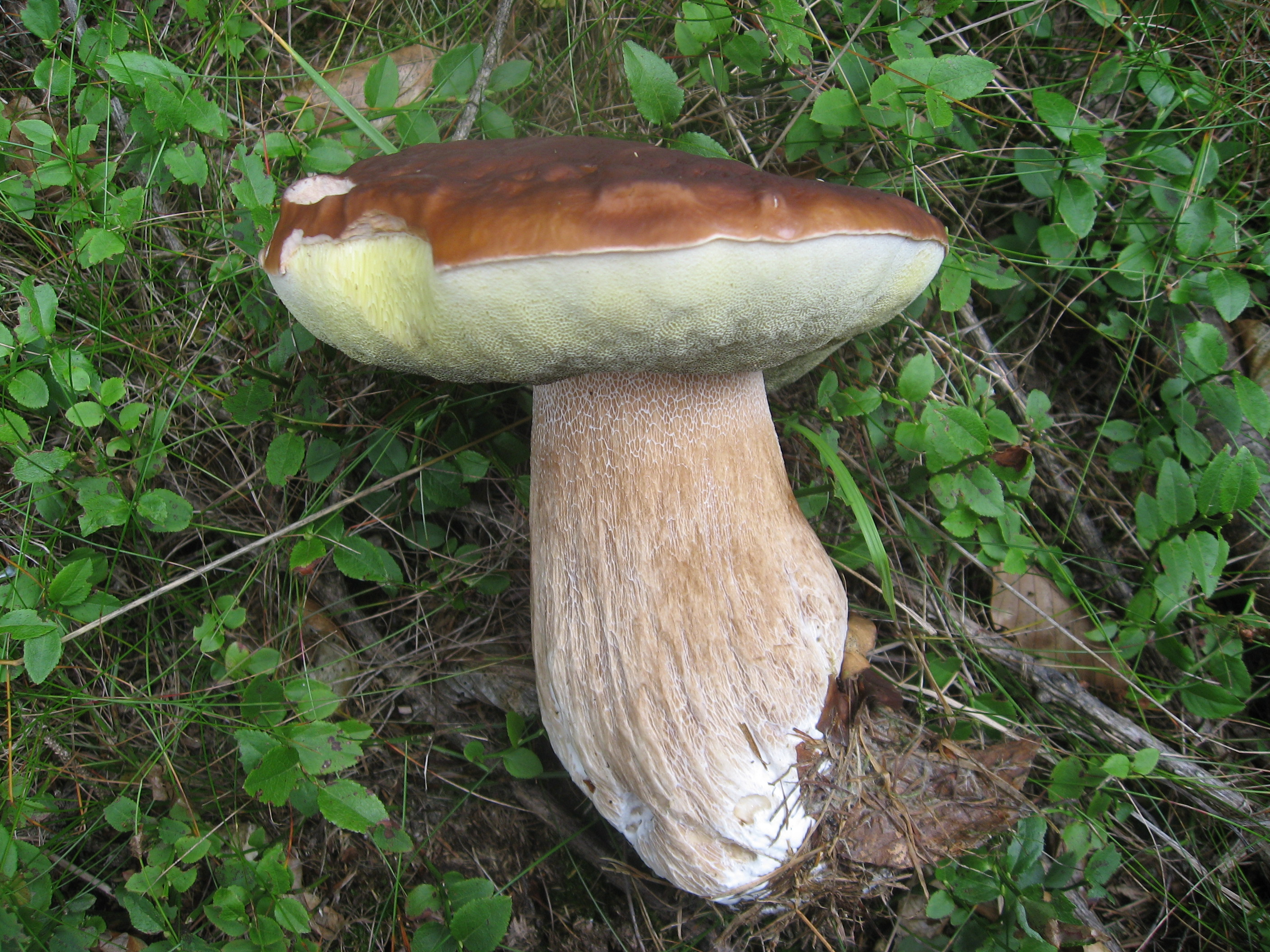 Hřib smrkový